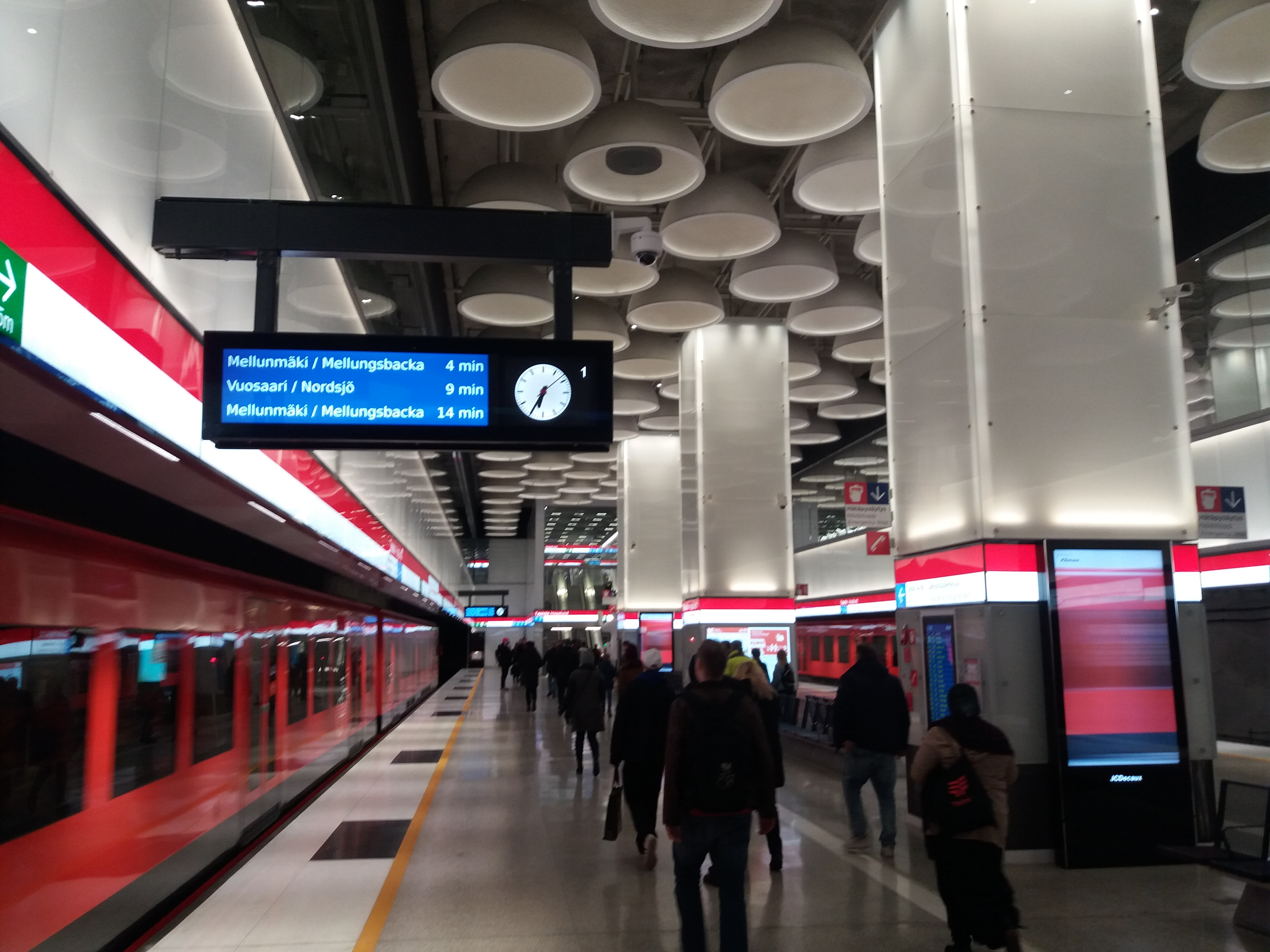 Tapiolan metroasema avajaispäivänään.